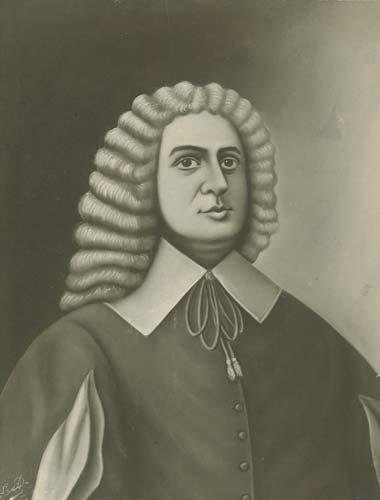 Jean-Jacques Blaise d’Abbadie.